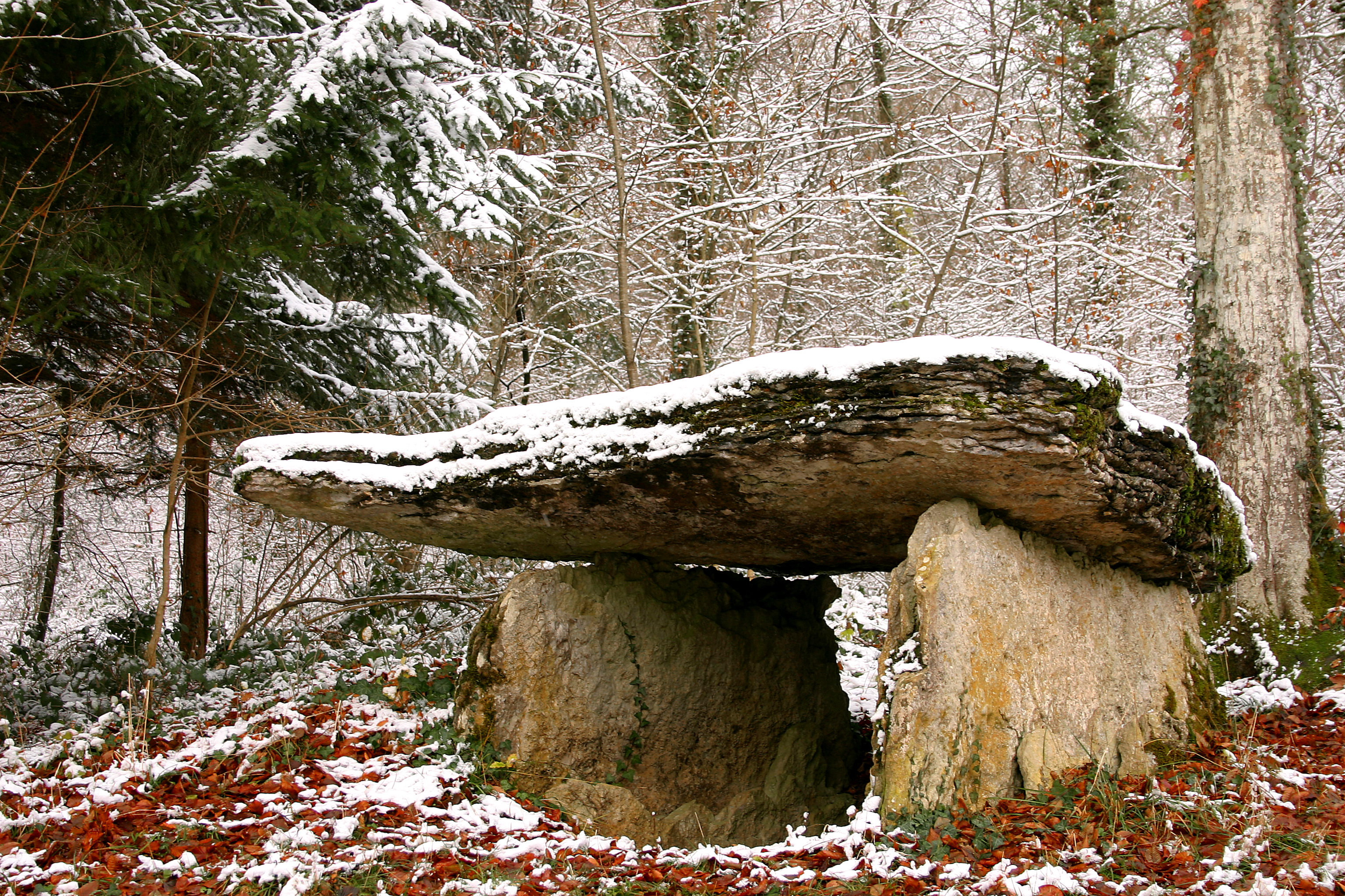 Photo de l'édifice prise en hiver.